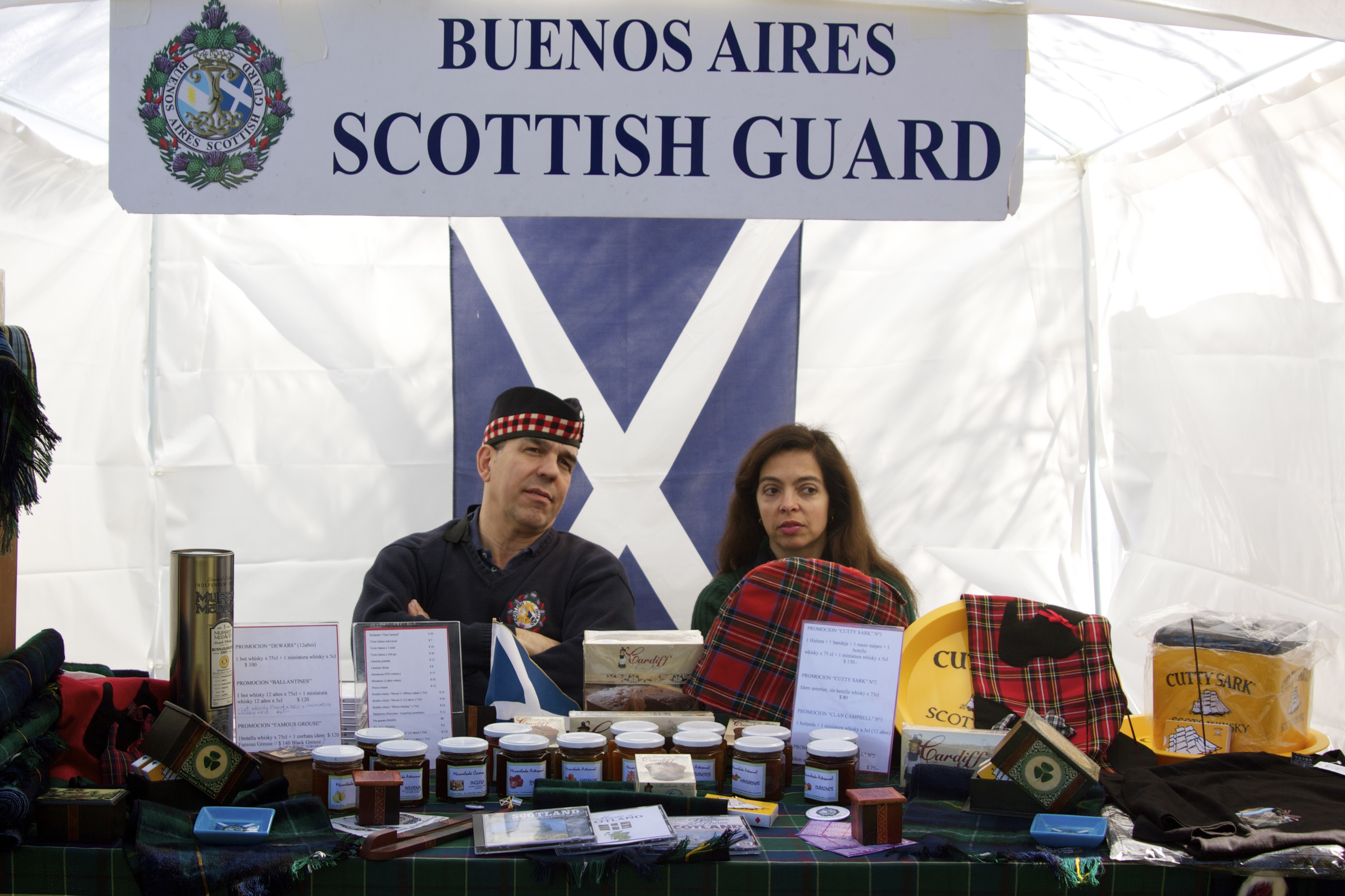 Dia del Inmigrante 2010 25